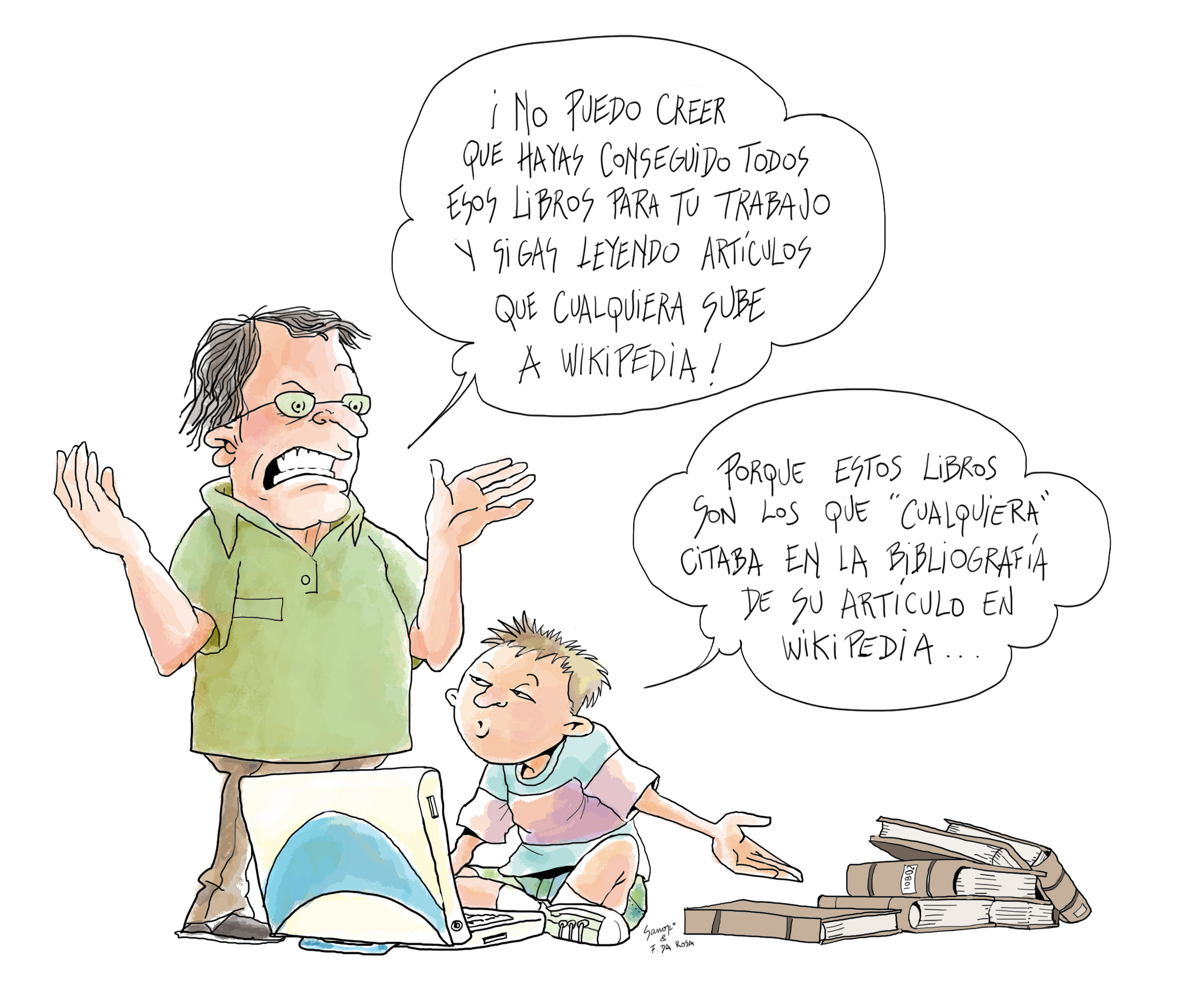 "Dibujos realizados para el libro "Wikipedia en la Educación" coordinado por el Prof. Fernando da Rosa" .